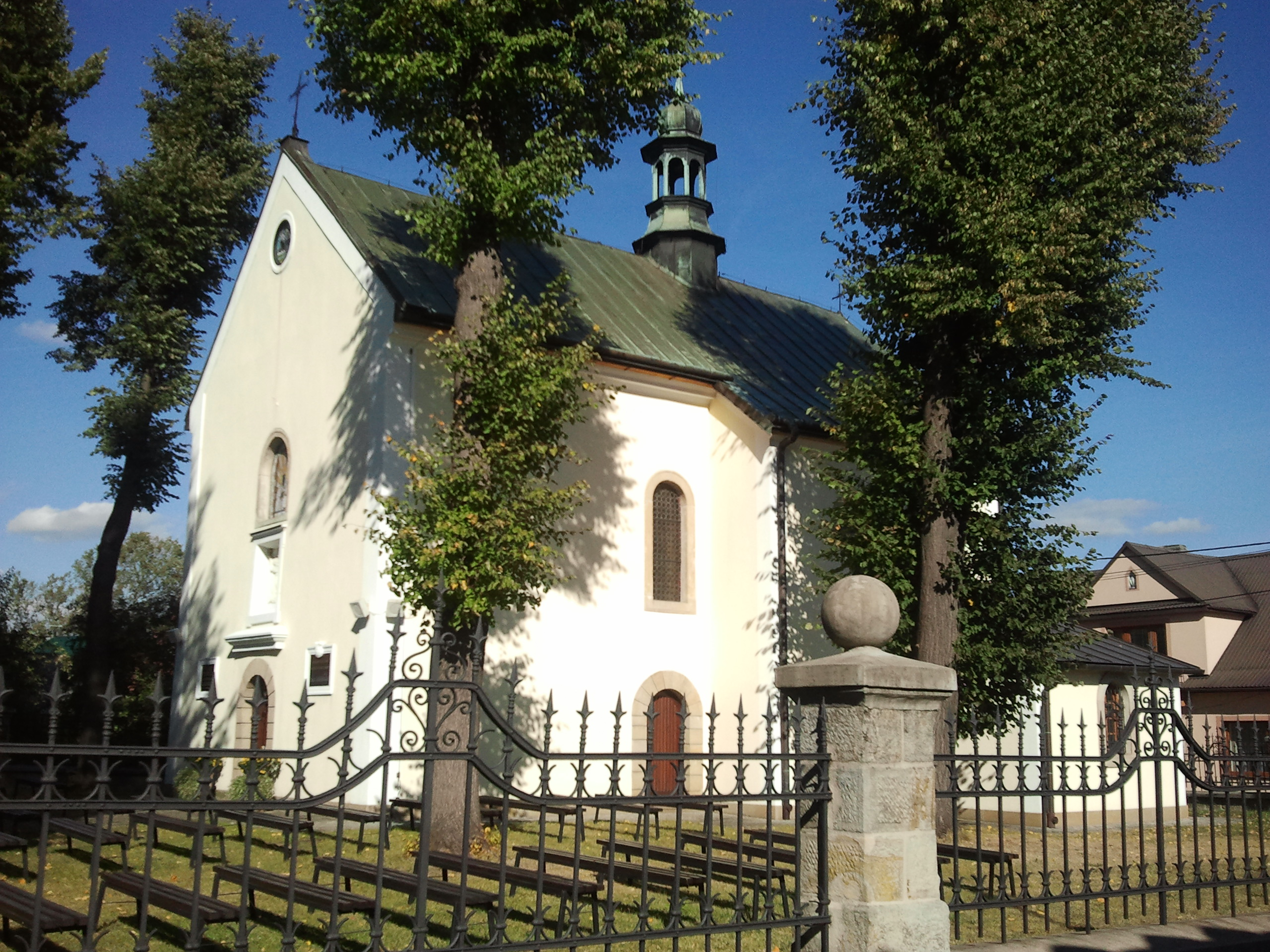 Lipnica Murowana - rzymskokatolicki kościół filialny pw. bł. Szymona z Lipnicy, XVII